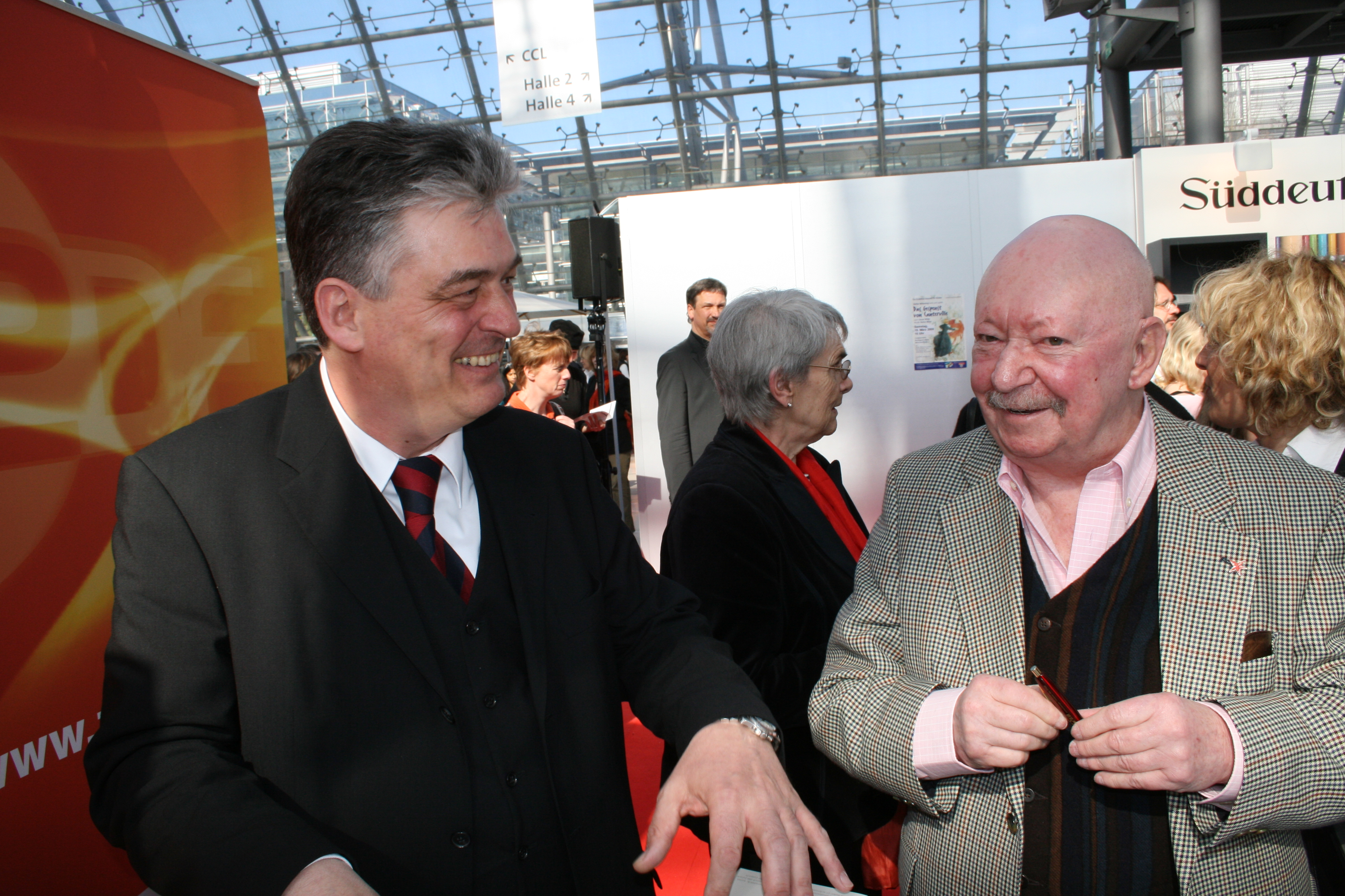 Dieses Fotos dürfen Sie honorarfrei nutzen, wenn Sie folgenden credit beachten: Copyright: Das blaue Sofa / Club Bertelsmann. Günter Kunert, 1929 in Berlin geboren, lebt bei Itzehoe. Zuletzt ershcien von ihm „Nachtvorstellung“(Gedichte, 1999), „Die Botschaft des Hotelzimmers an den Gast“ (2004), „Irrtum ausgeschlossen“ (2006), „Auskunft für den Notfall“ (2008), „Als das Leben umsonst war“ (Gedichte, 2009). Kunert wurde für sein Werk vielfach ausgezeichnet.